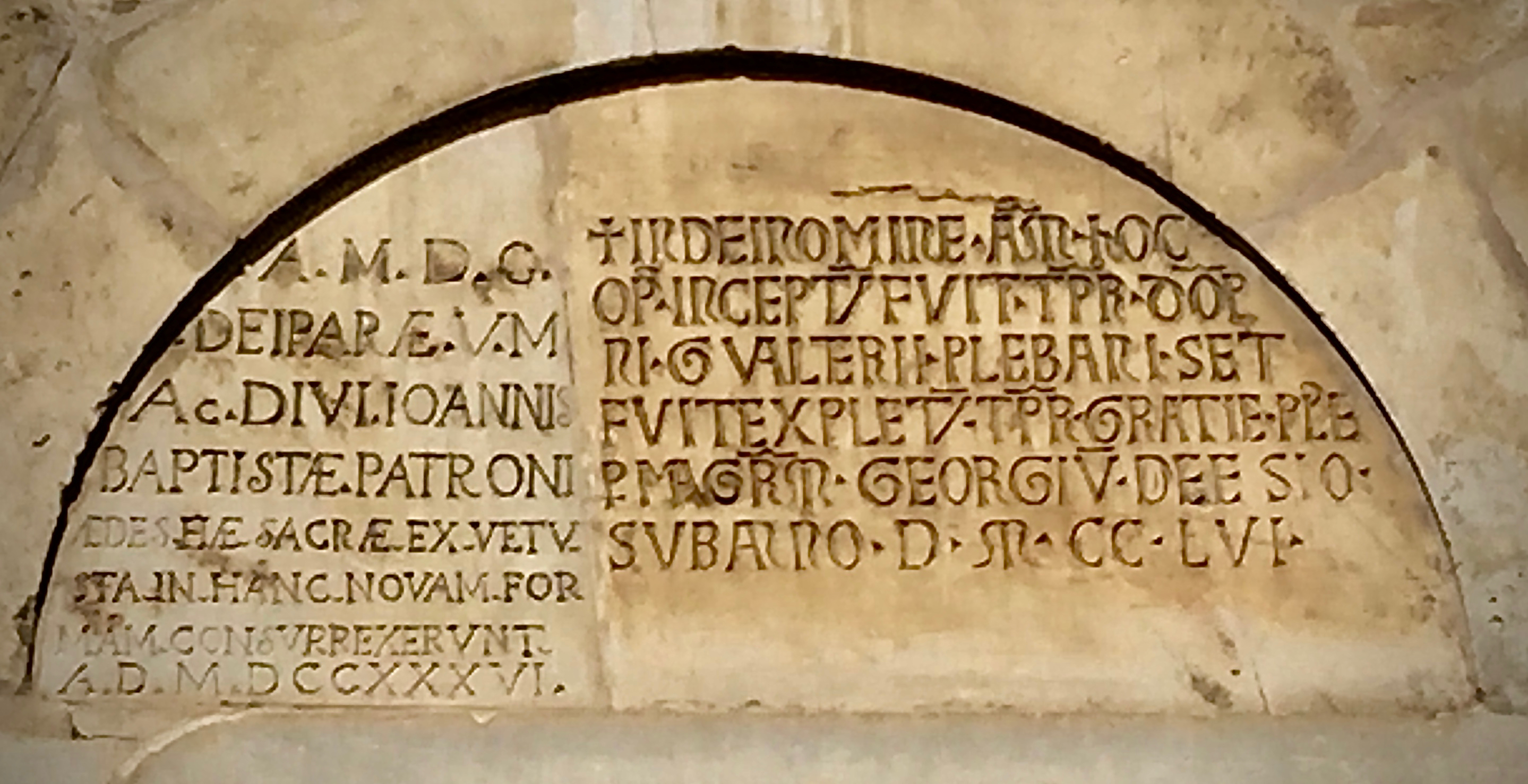 Penna San Giovanni_Pieve - dettaglio